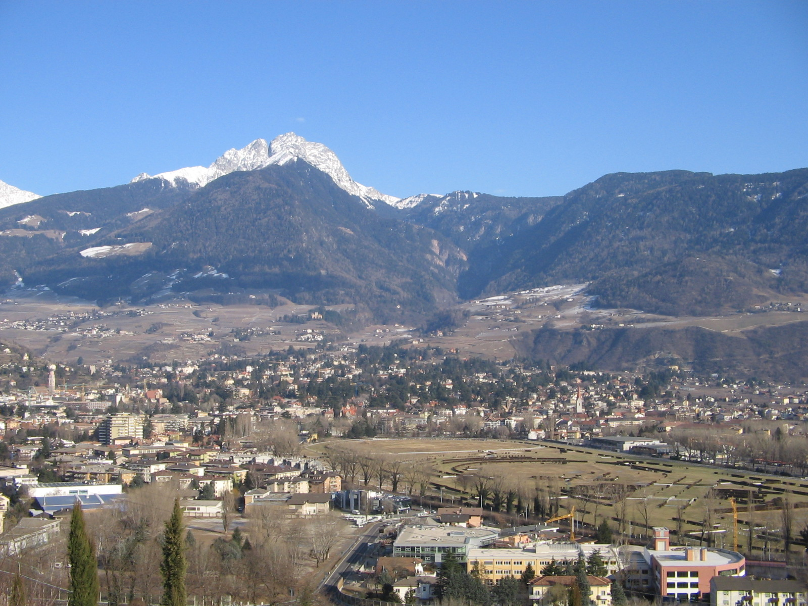 Stadt Meran mit Pferderennplatz und Ifinger